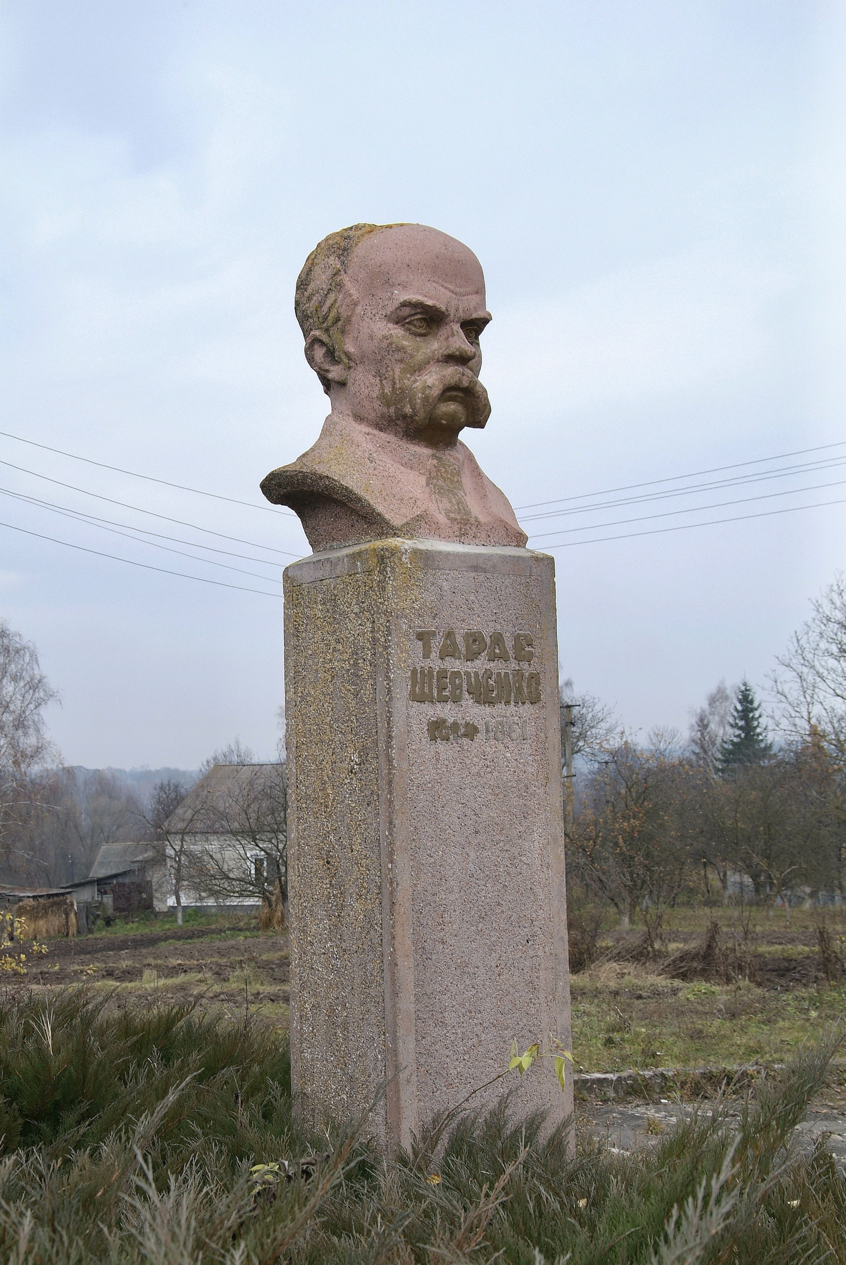 Пам'ятник поету, письменнику, художнику Шевченку Тарасу Григоровичу, село Мізюринці